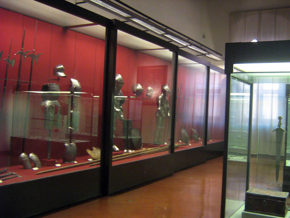 Vitrinas expuestas en el Museo Civico Medieval de Bolonia